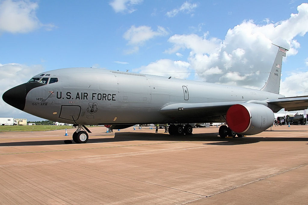 KC135 - RIAT 2008